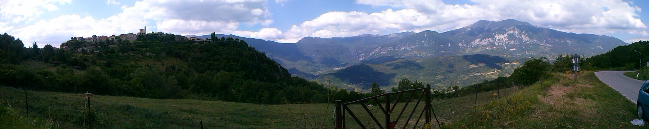 Foto panoramica della Val Roveto da Civita d'Antino